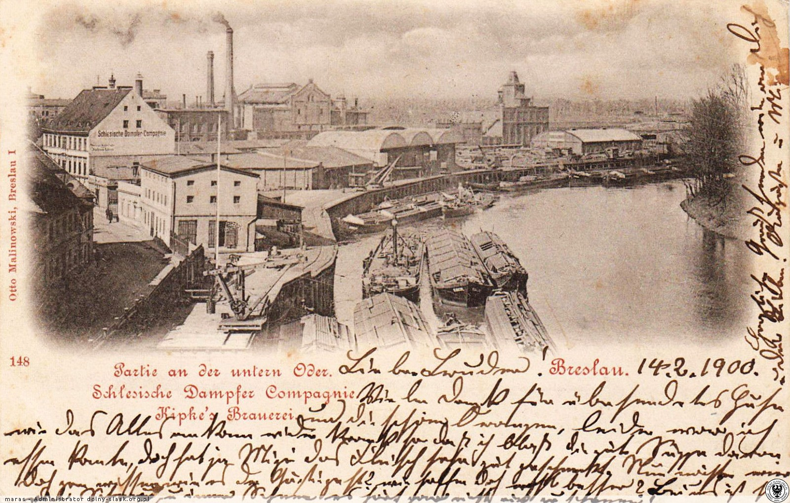 Browar C. Kipke Brauerei A.G." (ul. Długa)